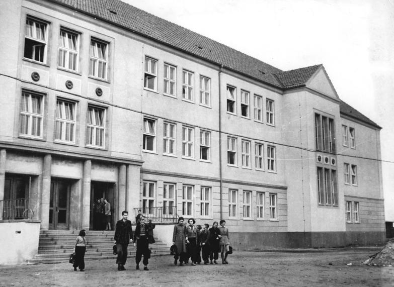 Neubrandenburg, Demminer Straße, Schule Zentralbild Klein 12 Motive 30.11.1955 Neue Schule und Kindergärten in Neubrandenburg Durch eine neue 16.klassige Schule, die zum jetzigen Schuljahr fertiggestellt wurde und deren Baukosten rund 2 (zwei) Millionen DM betrugen, konnte der Schichtunterricht in Neubrandenburg beseitigt werden. Eine fahrbare Schulzahnklinik betreut die kleinen Patienten an Ort und Stelle, vor allem im Kreisgebiet Neubrandenburgs. Für die Unterbringung der Kinder der im Berufsleben stehenden Mütter wurde eine Kinderkrippe, zwei Kindergärten, ein Betriebskindergarten und zwei Horte gebaut. UBz: Die neue 16.klassige Schule in der Demminer Strasse. Sie ist nach den neuesten pädagogischen Gesichtspunkten erbaut und eingerichtet worden.